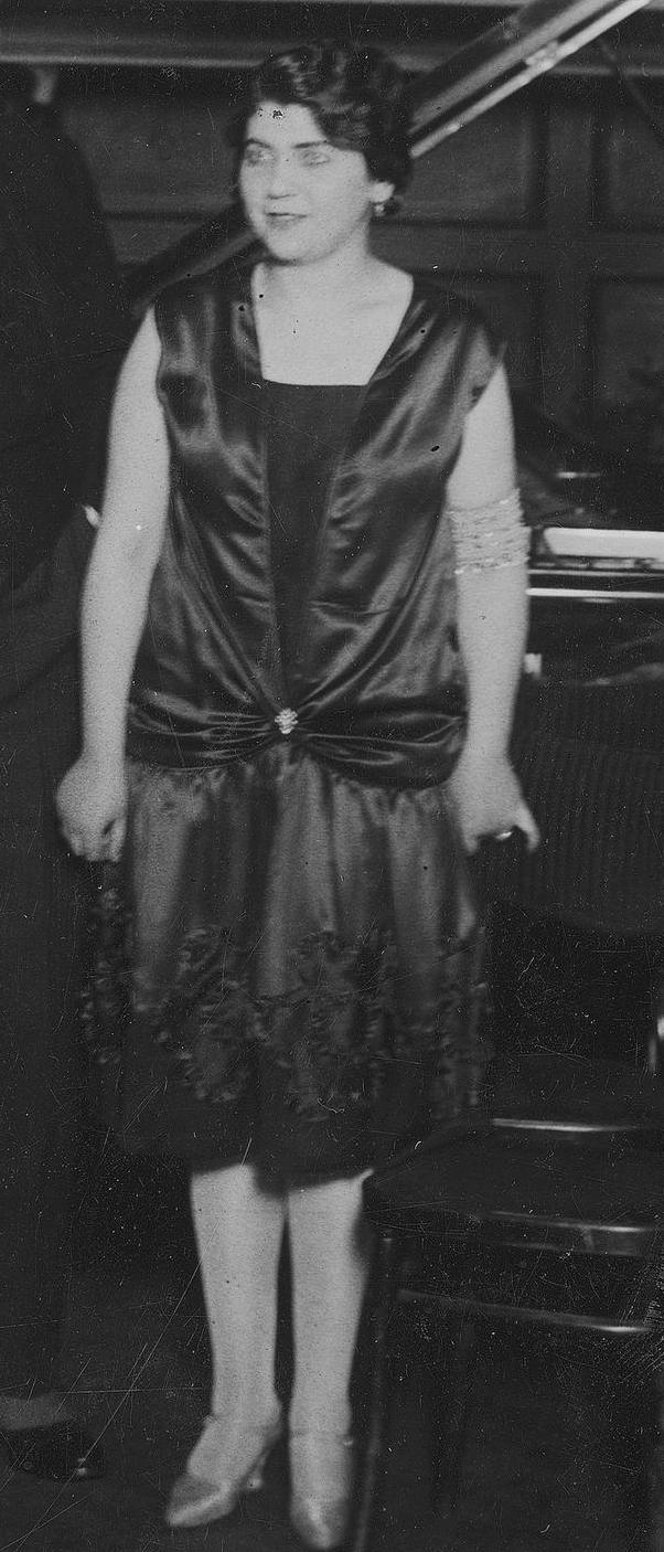 Pianistka Róża Etkin na I Konkursie Chopinowskim (1927)